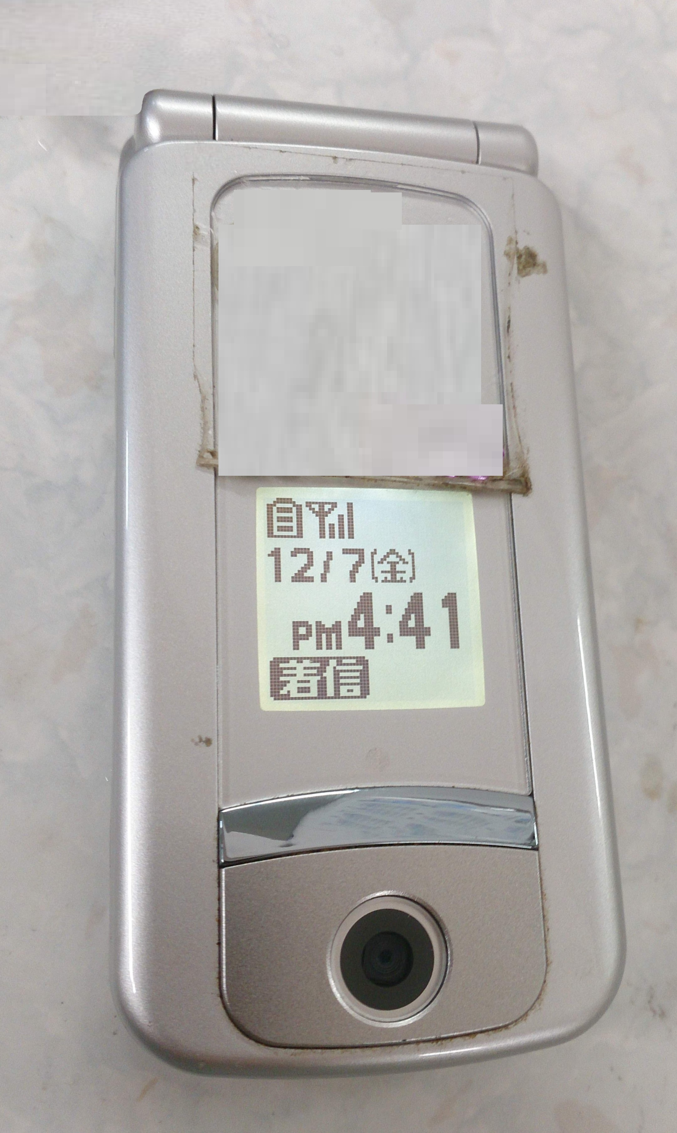 F883iESのシルバー本体の外観（サブディスプレイ点灯時）